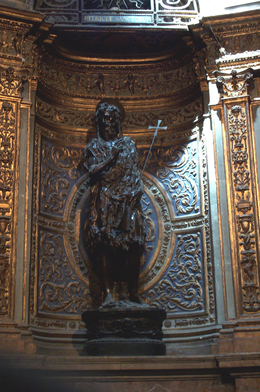 Duomo de Sienne - Toscane - Italie